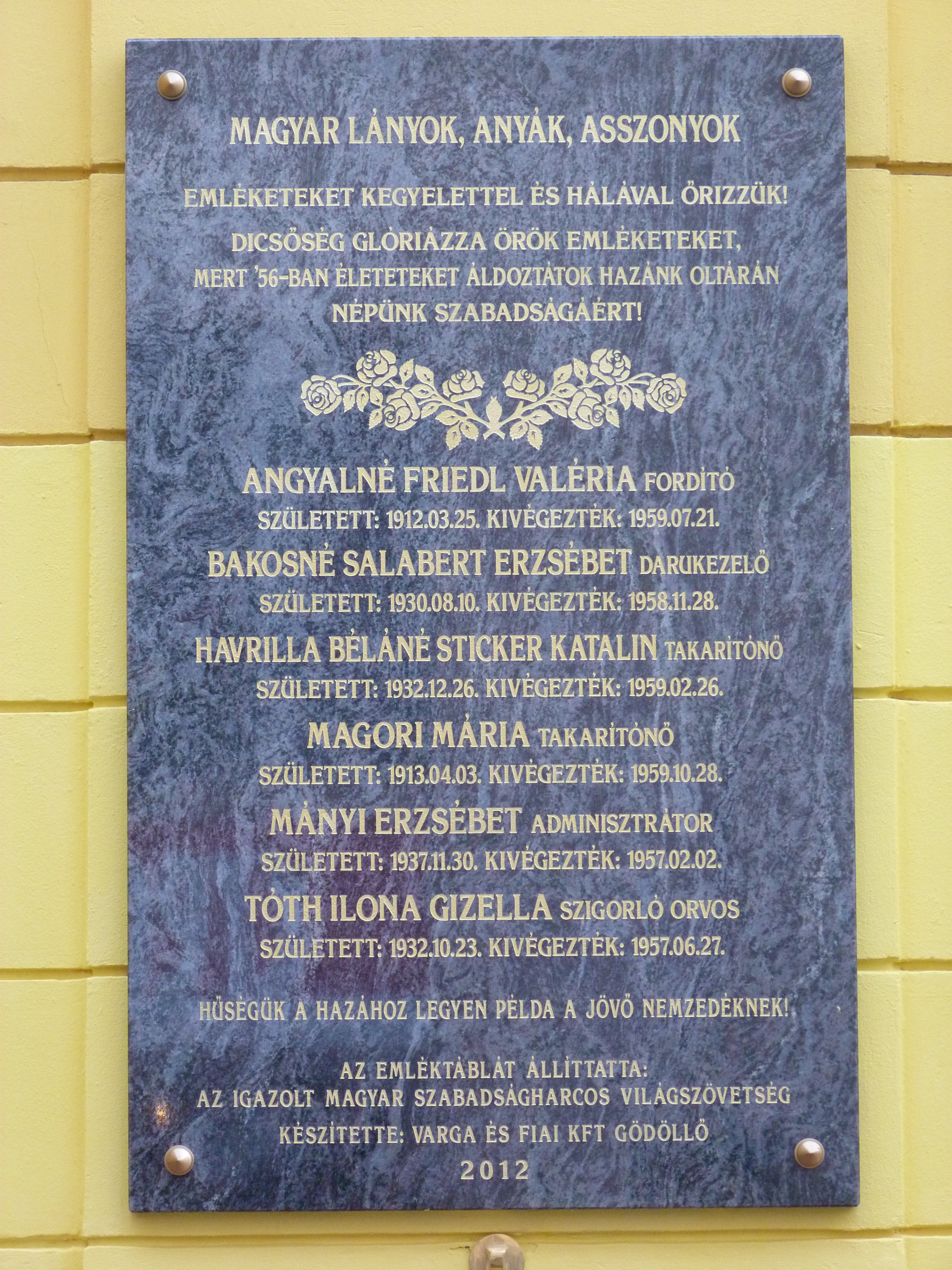 A felvétel 2012. december 5 -én készült Budapesten, a Józsefvárosban. Corvin köz. ©© Published under Creative Commons in the Metapolisz DVD line. All of the photos and vids in the Metapolisz DVD line are under Creative Commons and can be used even for commercial – for profit – purposes. Recommended Citation Derzsi Elekes Andor: Metapolisz DVD line ©© Megjelent Creative Commons alatt a Metapolisz sorozatban. A Metapolisz sorozat valamennyi képe és filmje Creative Commons alatti valamint kereskedelmi - for profit - célra is felhasználható. Ajánlott hivatkozás: Derzsi Elekes Andor: Metapolisz DVD line Másik fénykép ugyanerről az emléktábláról: File:Budapest-corvin-angyalne-1.jpg